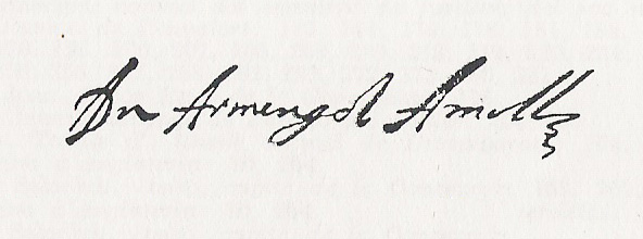 Firma di Armengol Amill